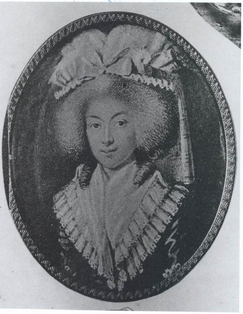 Konstancja z Czartoryskich Zamoyska